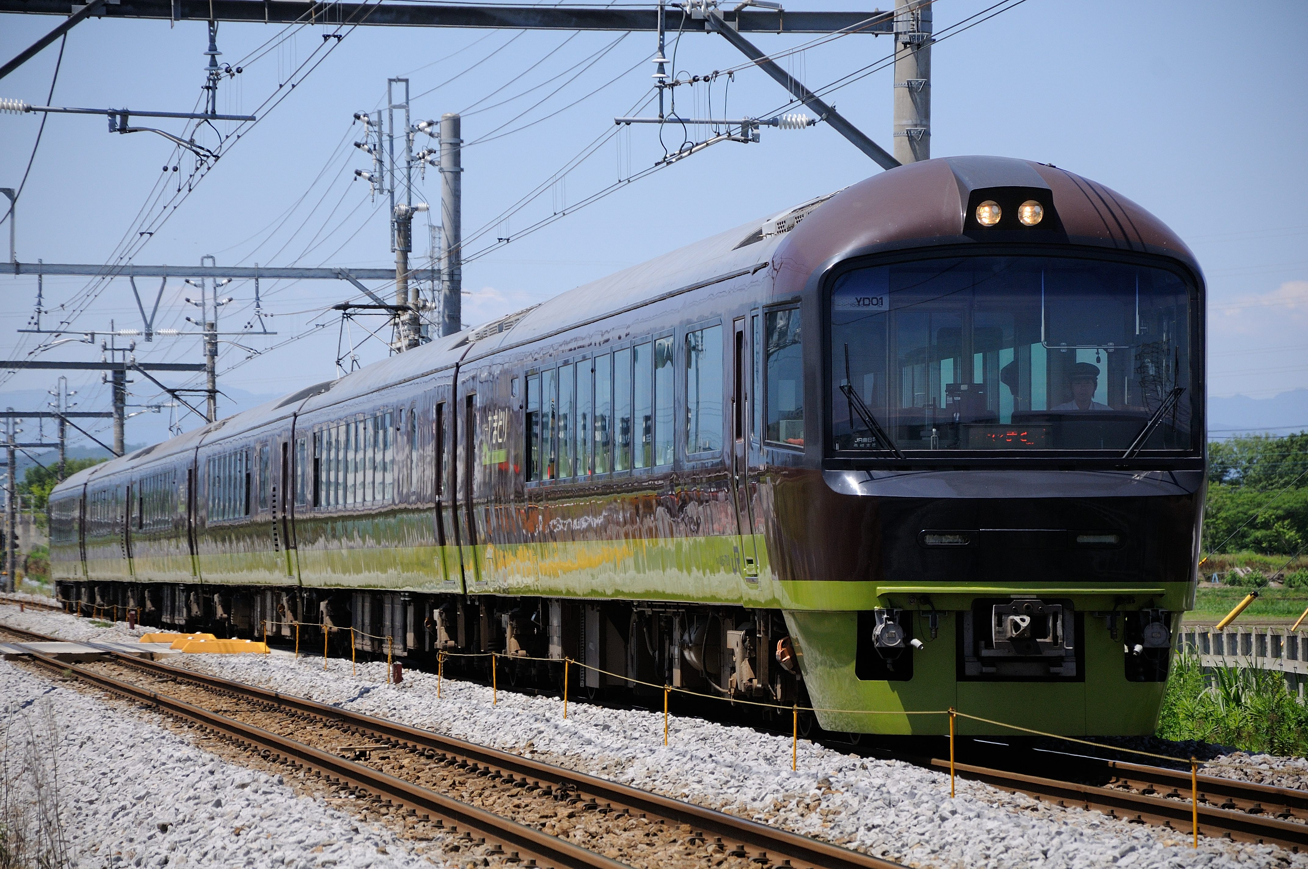 485系リゾートやまどり。上越線井野-新前橋間にて撮影。